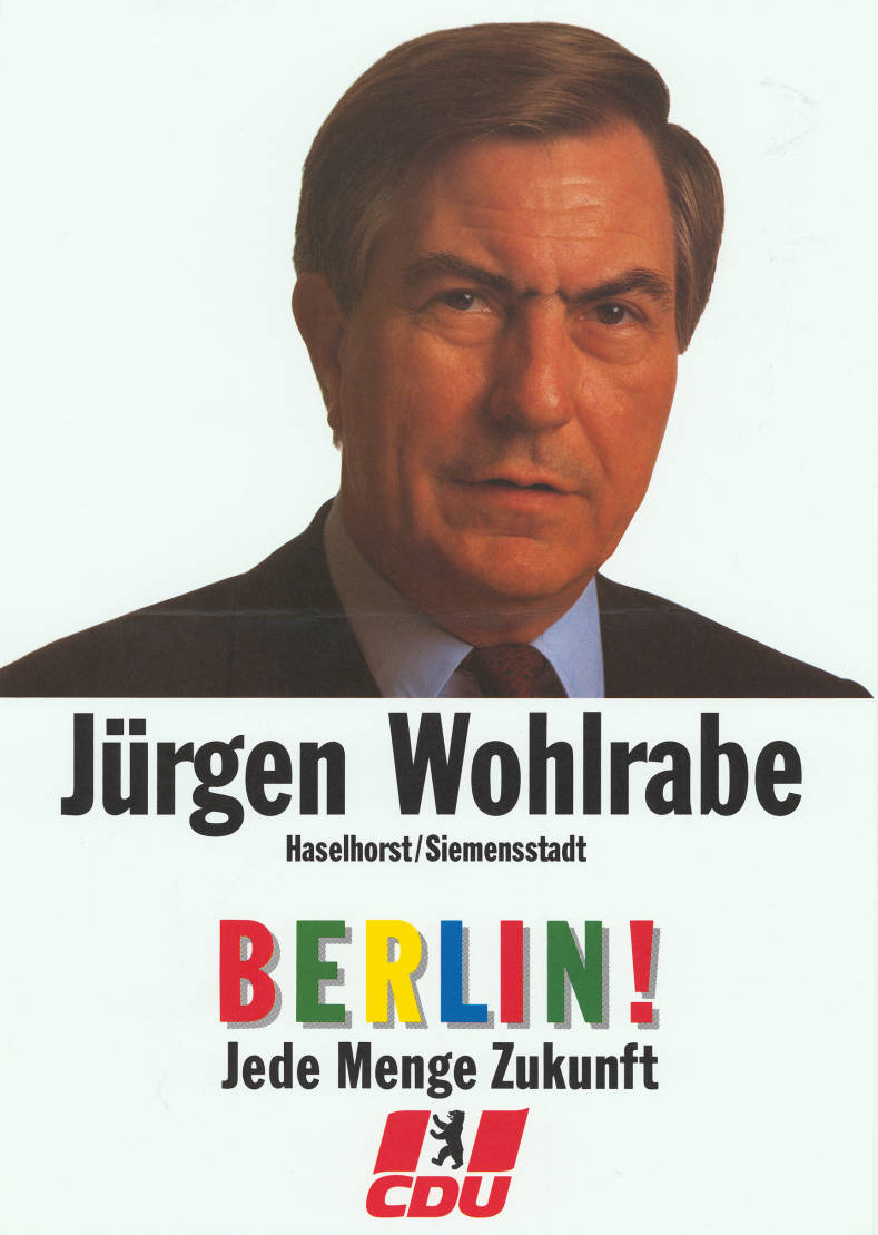 Jürgen Wohlrabe ... Berlin! Jede Menge Zukunft CDU Abbildung: Porträtfoto - Berliner Bär Plakatart: Kandidaten-/Personenplakat mit Porträt Objekt-Signatur: 10-004 : 753 Bestand: Plakate zu Abgeordnetenhauswahlen Berlin (10-004) GliederungBestand10-18: Plakate zu Abgeordnetenhauswahlen Berlin (10-004) » CDU Lizenz: KAS/ACDP 10-004 : 753 CC-BY-SA 3.0 DE